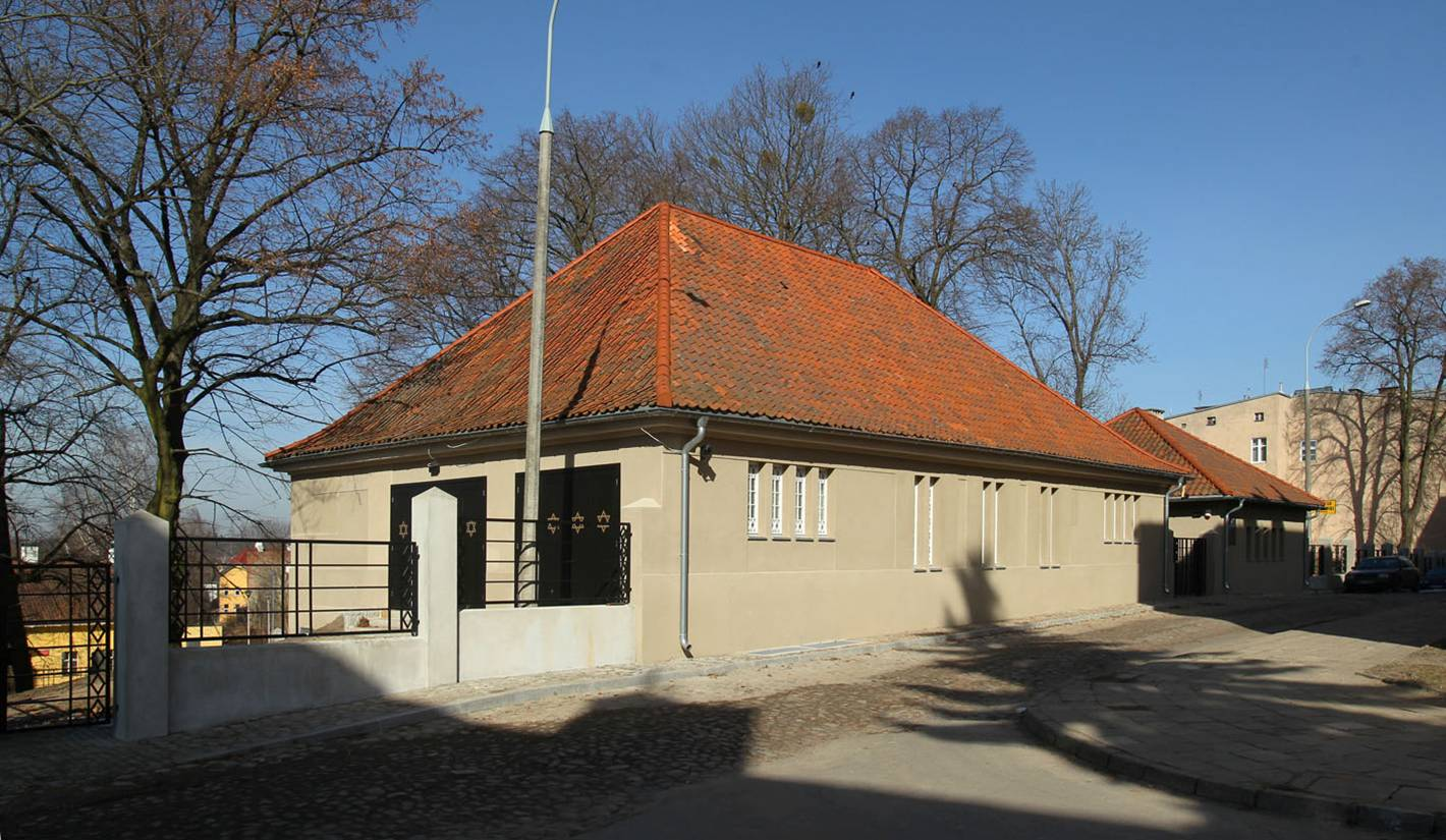 Außenansicht der Bet Tahra in Olsztyn nach der Restauration, 2012